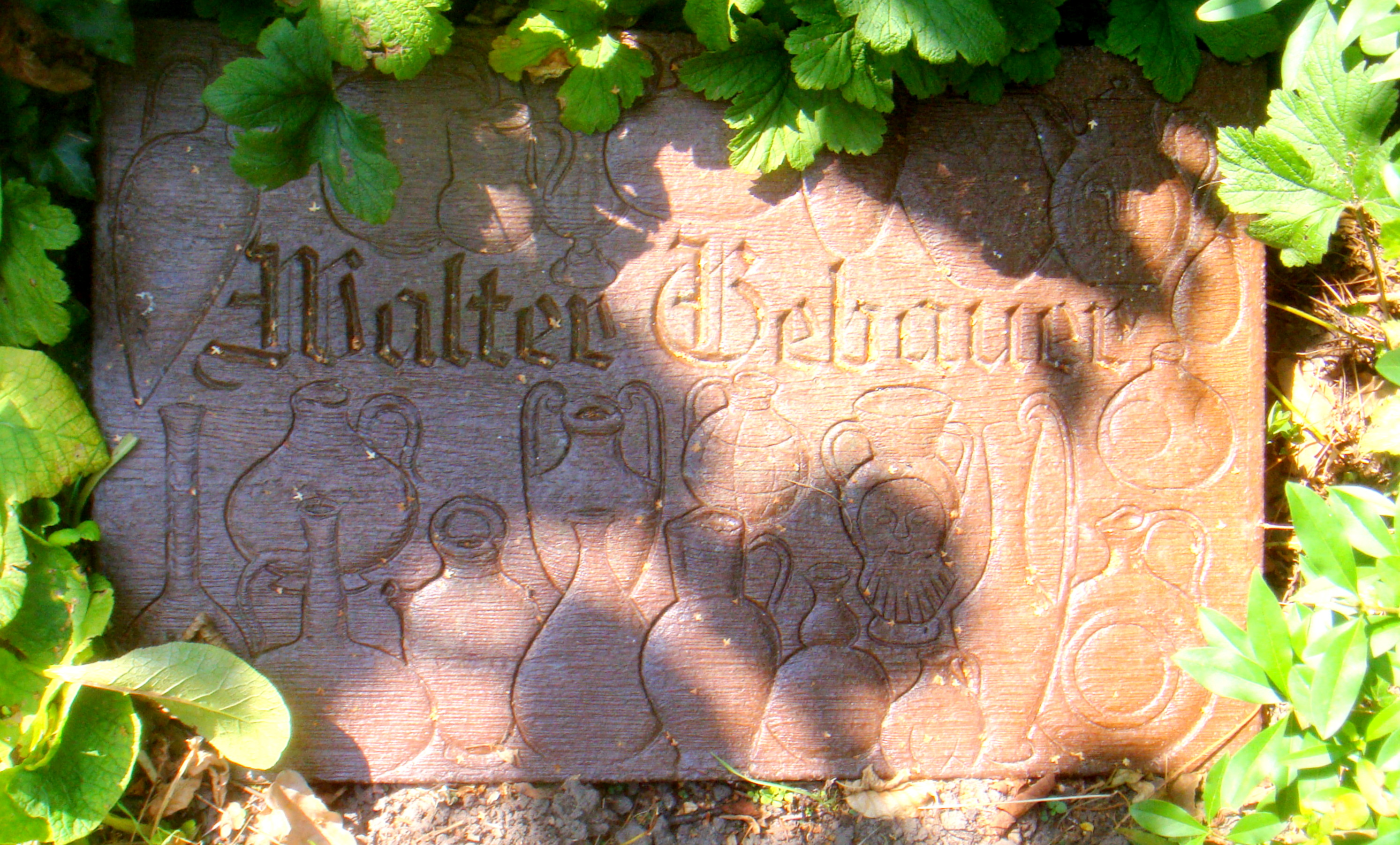 Grabplatte für Walter Gebauer auf dem Familiengrab in Bürgel